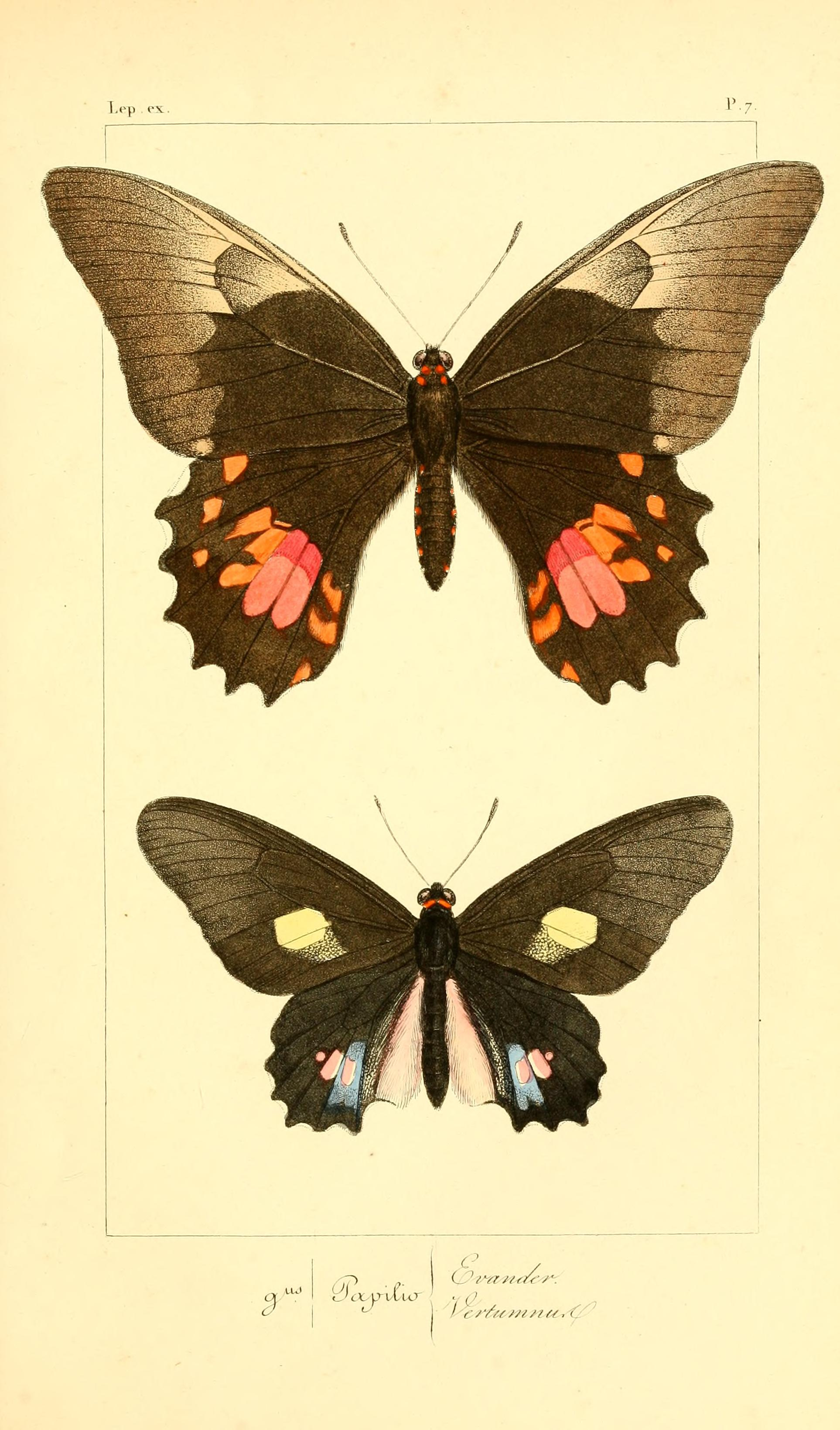 Histoire naturelle des lépidoptères exotiques / par H. Lucas ; ouvrage orné de 200 figures peintes d'après nature par Pauquet et gravées sur acier.